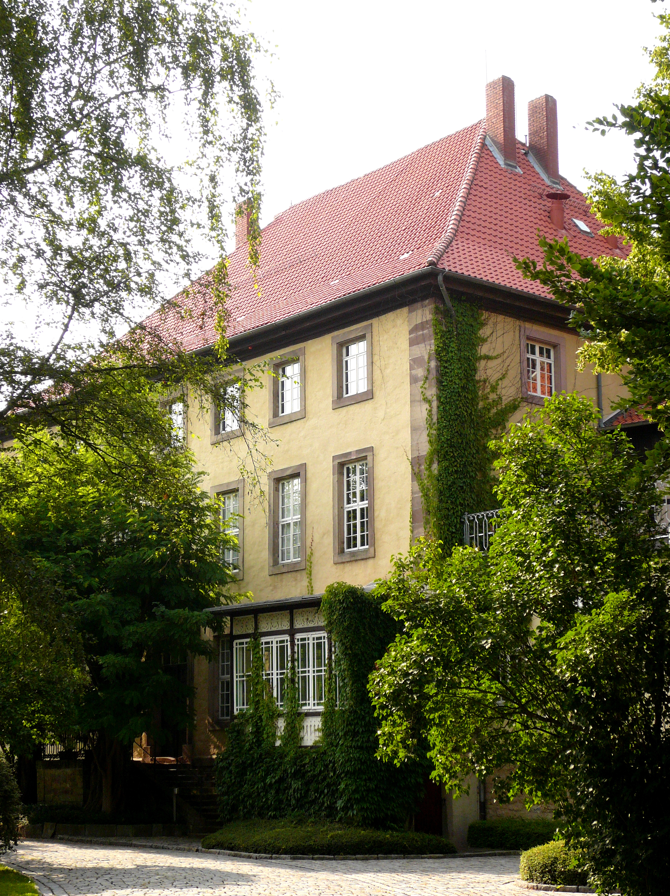 Ehemaliges Amtshaus in der Domäne Harste, erbaut 1737, Verwaltungssitz des Amtes Harste bis zu dessen Auflösung 1823